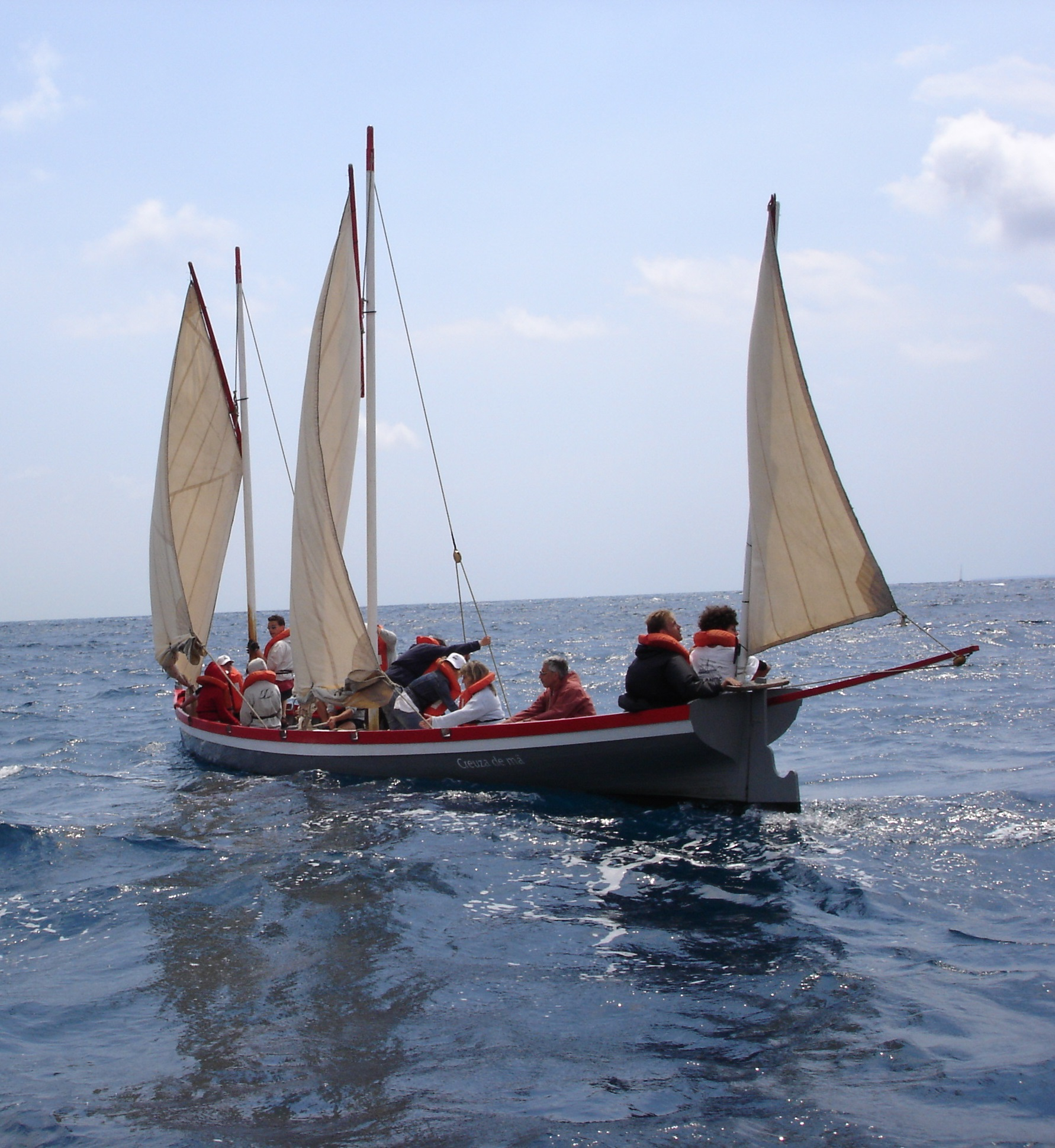 "Creuza de Mä", la yole de Bantry de Gènes (Italie) aux Rencontres de yoles de Méditerranée, Villefranche-sur-Mer, juin 2015